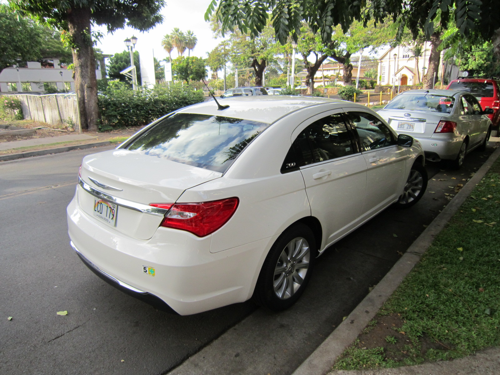 Chrysler 200